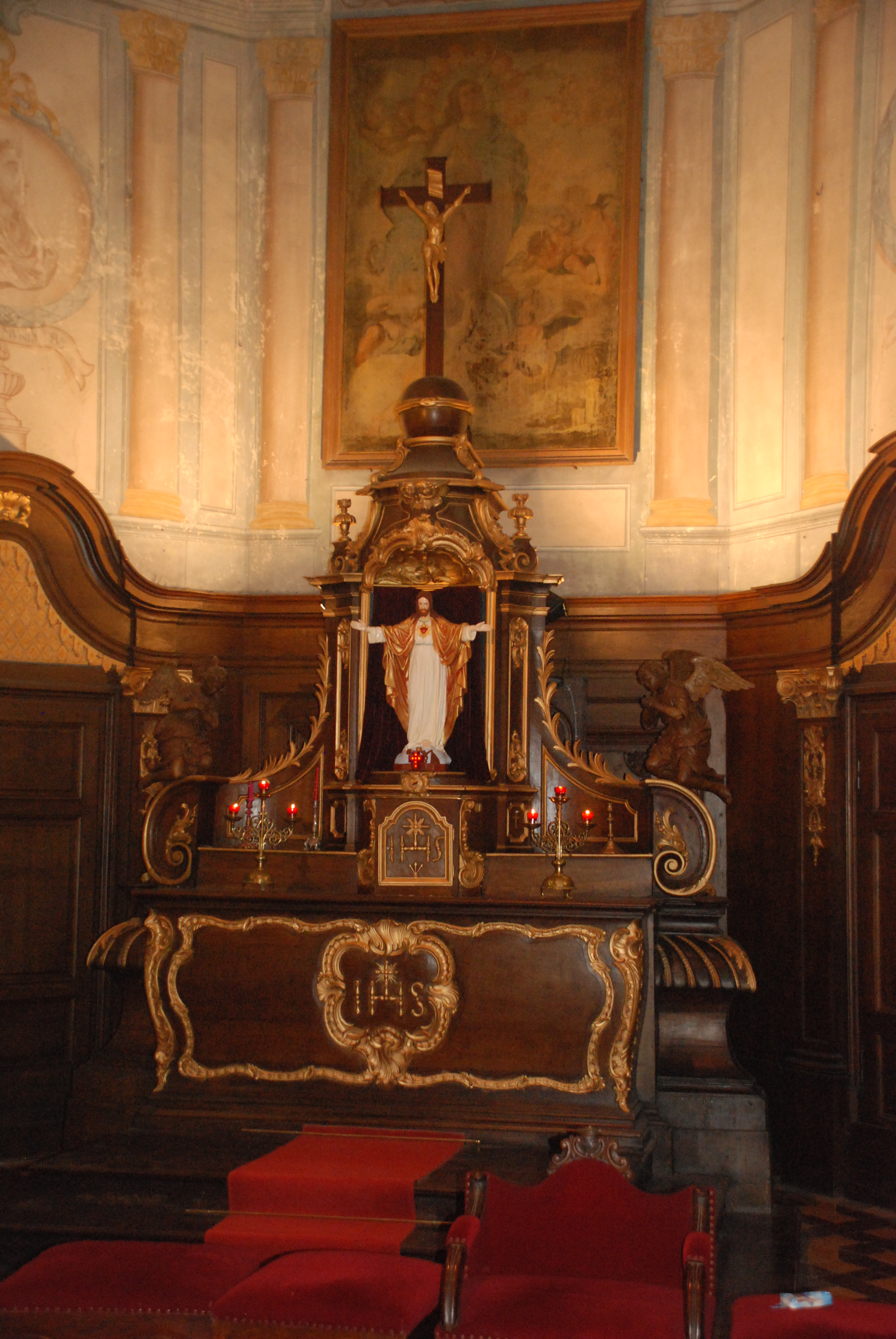 Belgique - Brabant wallon - Église Saint-Martin de Ways